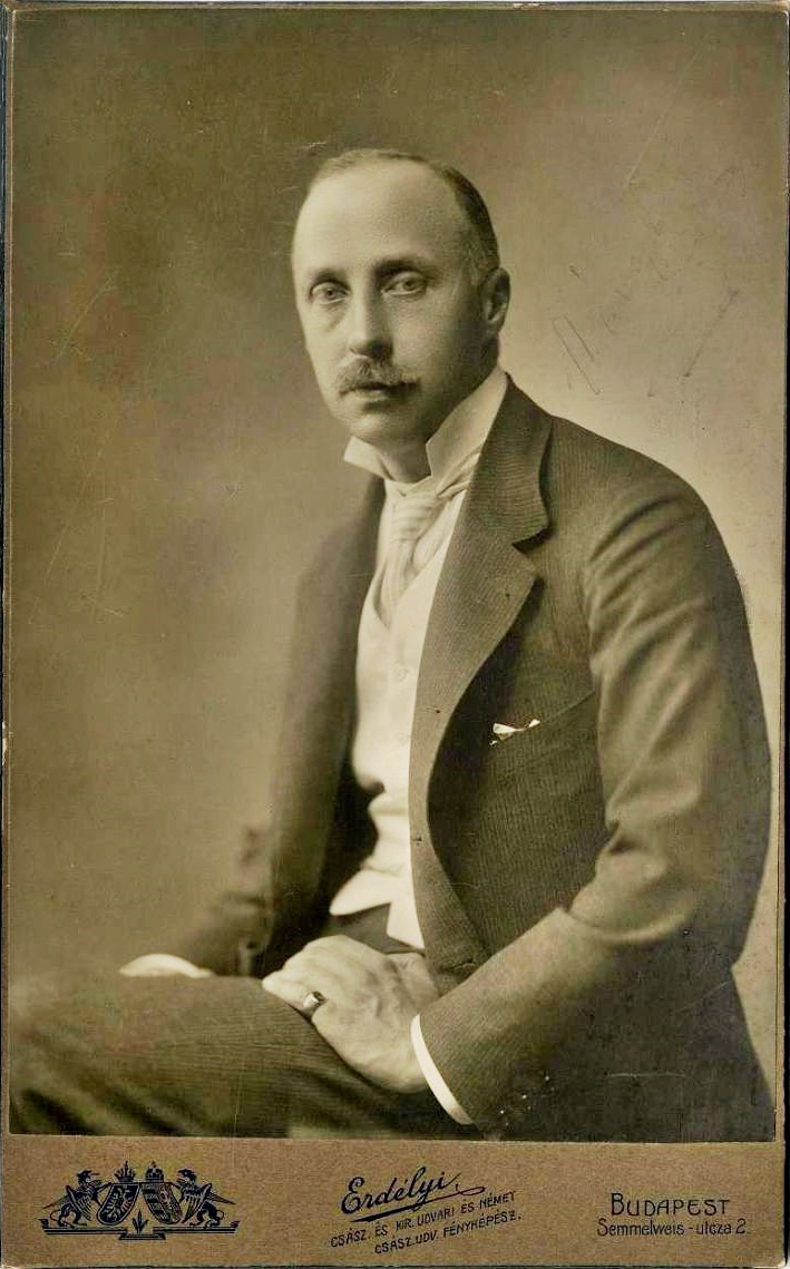 Návay Lajos politikus, országgyűlési képviselő